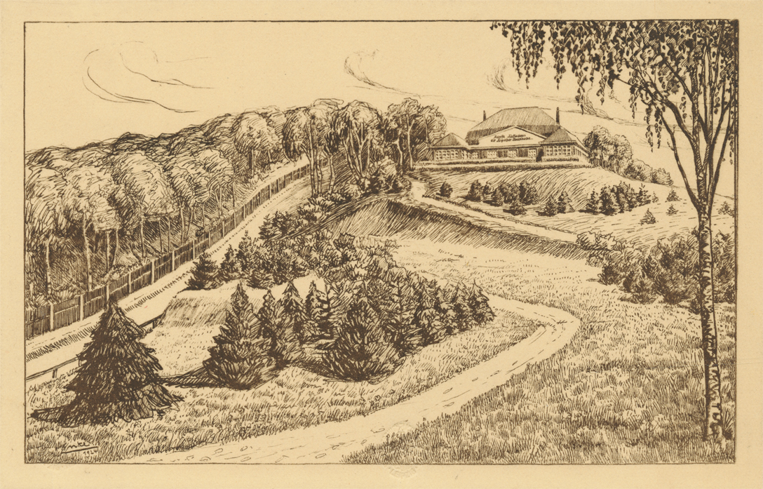 "Leipziger Rodelbahn mit Kaffeehaus a. d. Bienitz" (Postkarte, 1929, Ansika Ansichtskartenvertrieb L. Weiland), Stadtgeschichtliches Museum Leipzig, Inv.-Nr. Bienitz 1